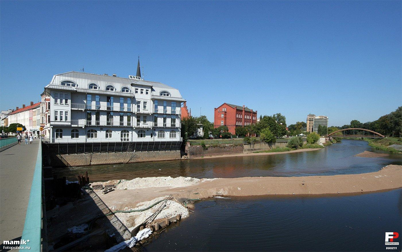 Widok na Guben z mostu granicznego. Od lewej Frankfurter Straße, nad brzegiem charakterystyczny budynek siedziba tzw. służb (cło, policja). Następnie budynek z czerwonej cegły (dawny sąd okręgowy) i wysoki budynek dawnej fabryki, opuszczony i czekający na lepsze czasy, obok niego kładka pieszo-rowerowa na wyspę Teatralną czyli do Gubina. Podobny widok przed wojną